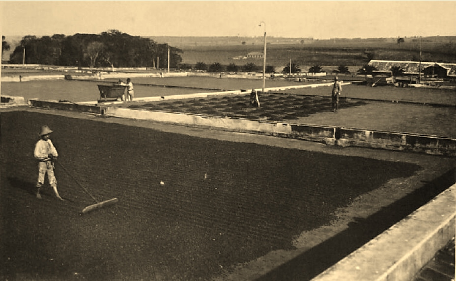 Processo de secagem manual do café na Fazenda Santo Antonio, em Araras – SP, de propriedade da família Penteado.